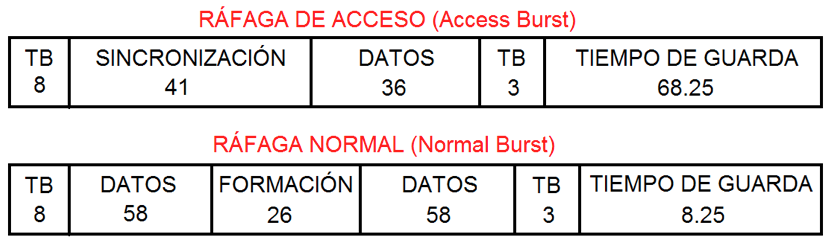 Descripcion de la composición de las rafagas de acceso i las rafagas normales en TDMA.